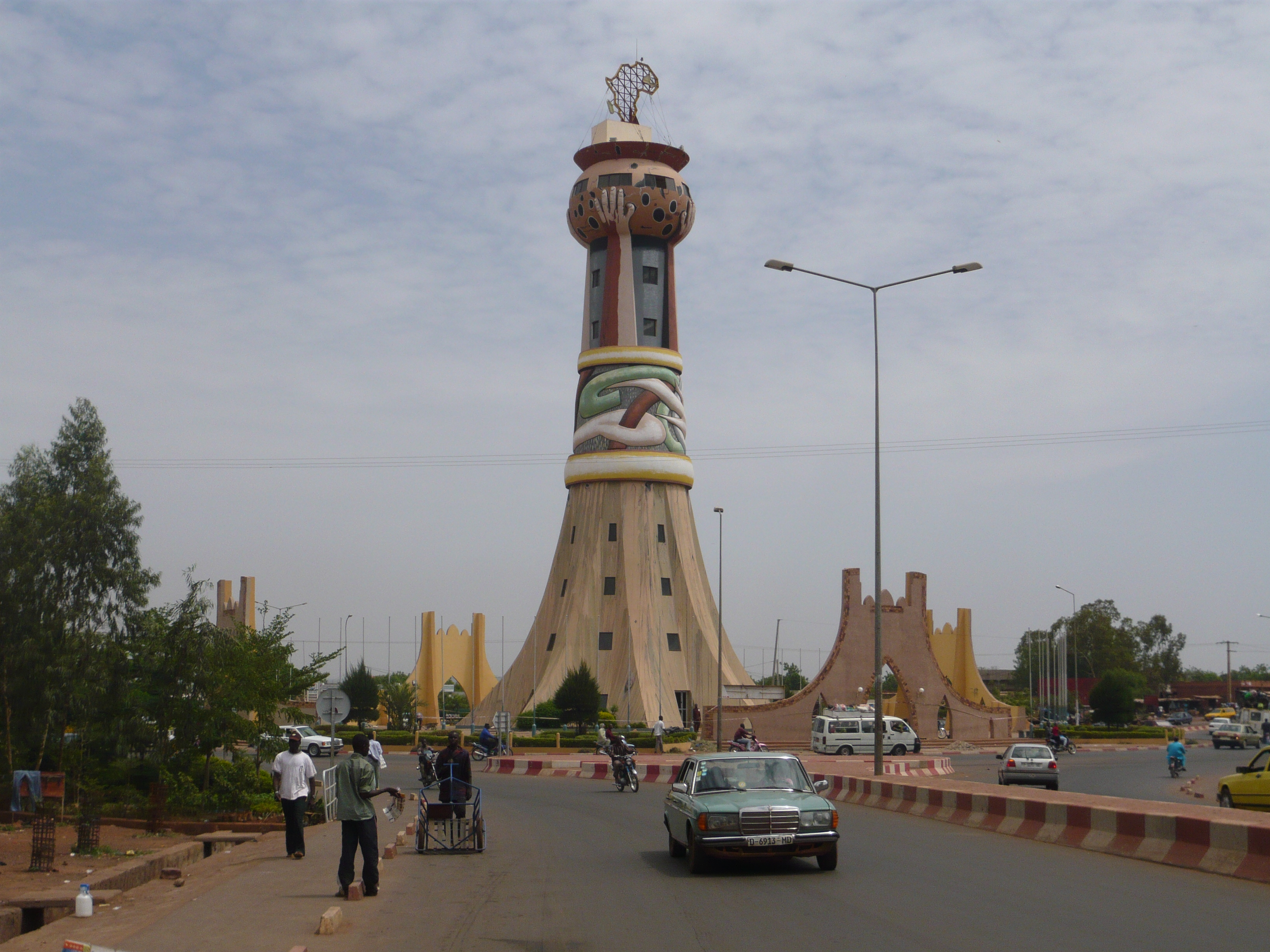 La Tour d'Afrique, Faladié - Bamako, Mali